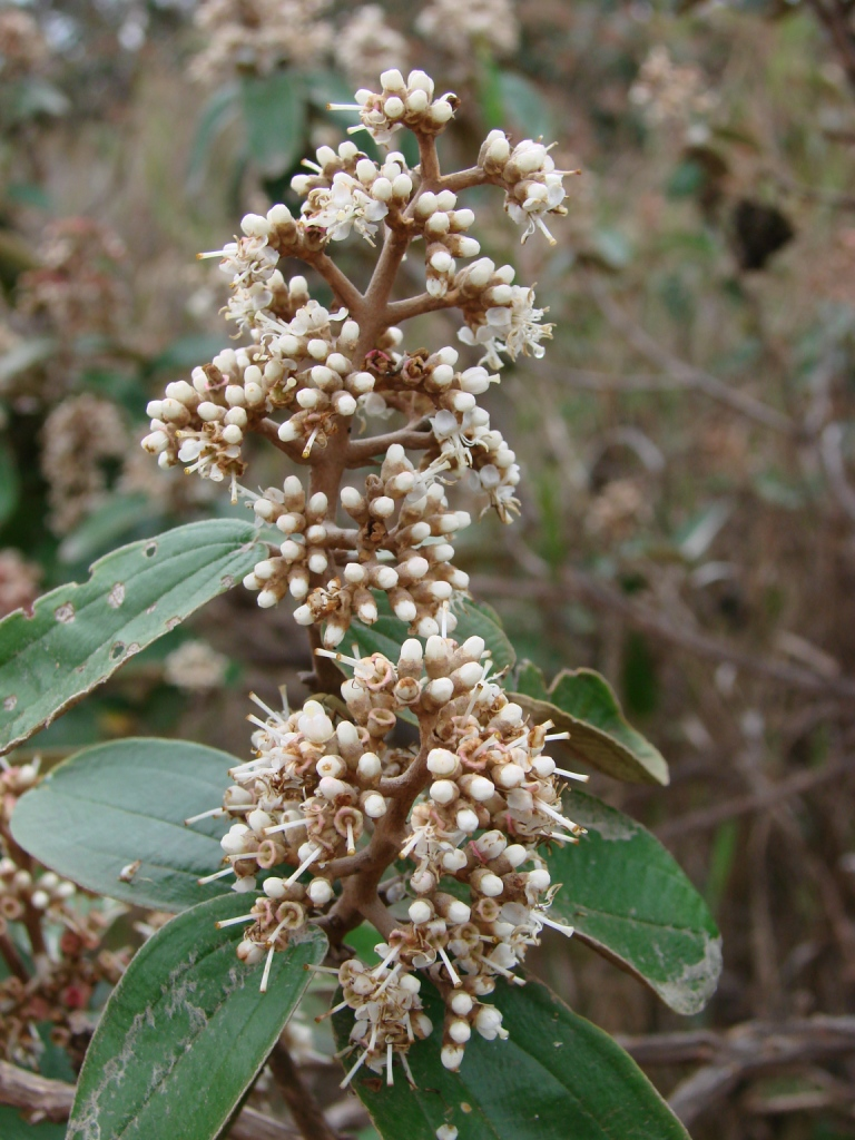 Miconia albicans (Sw.) Triana - MELASTOMATACEAE - Jardim Botânico de Brasília - Distrito Federal - Brasil.